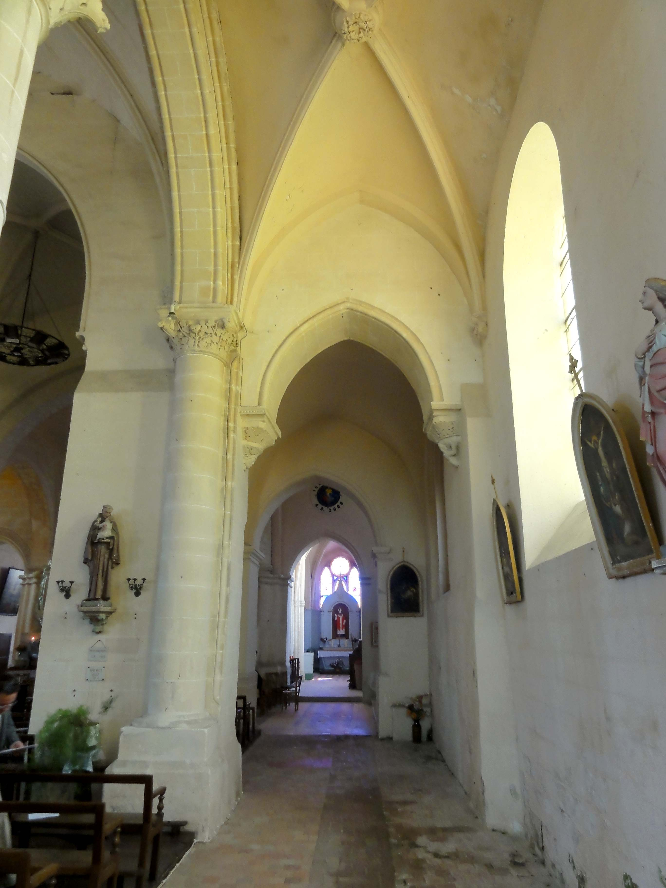 Intérieur de l'église Saint-Vaast de Nointel (voir titre).